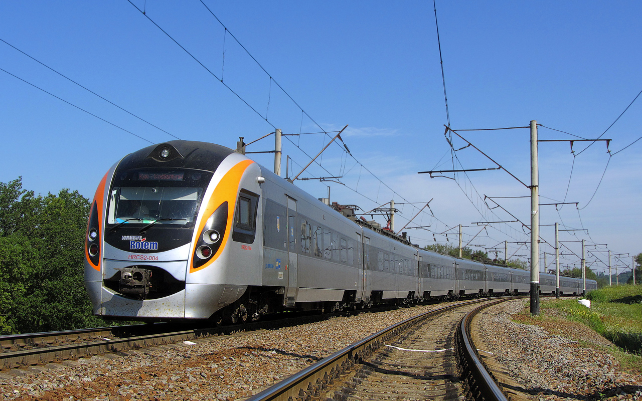 Электропоезд HRCS2-004 Киев - Константиновка на разъезде 328 км ЮЖД 16.07.2016